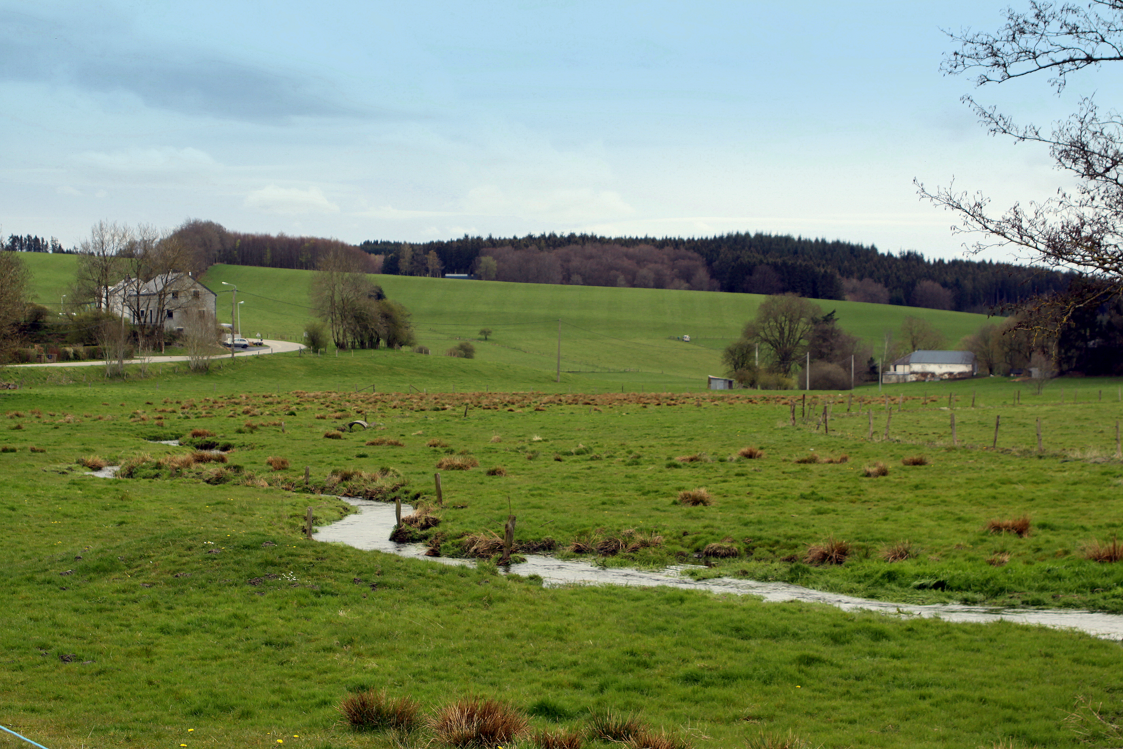 D'Strange zu Salvacourt